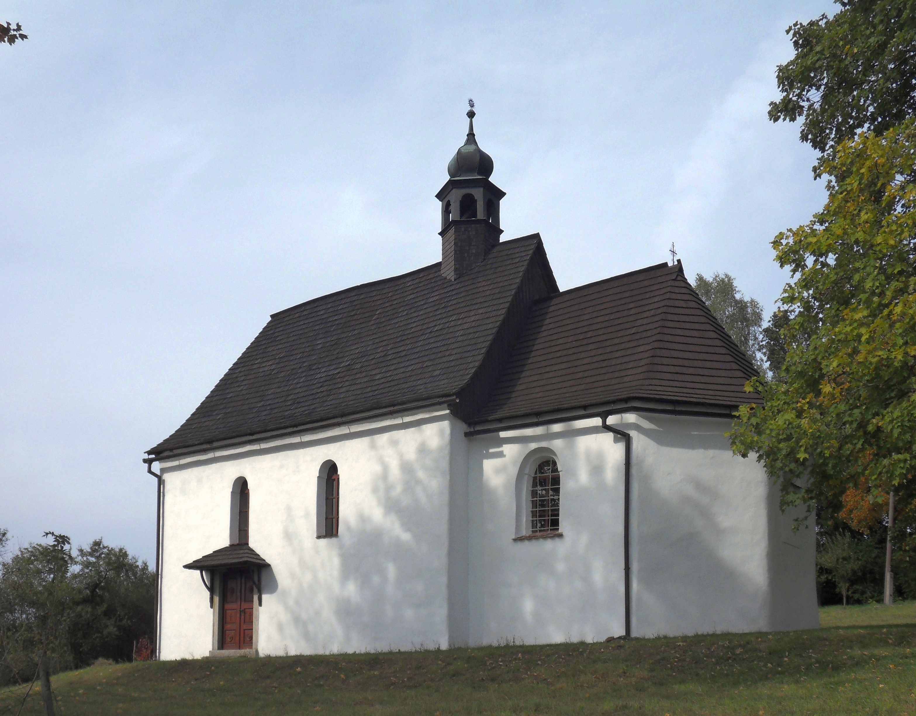 Pohled od jihovýchodu na kapli svatého Václava, nacházející se na západě vsi poblíž cesty k zaniklé osadě Studánky, Brůdek (Všeruby).